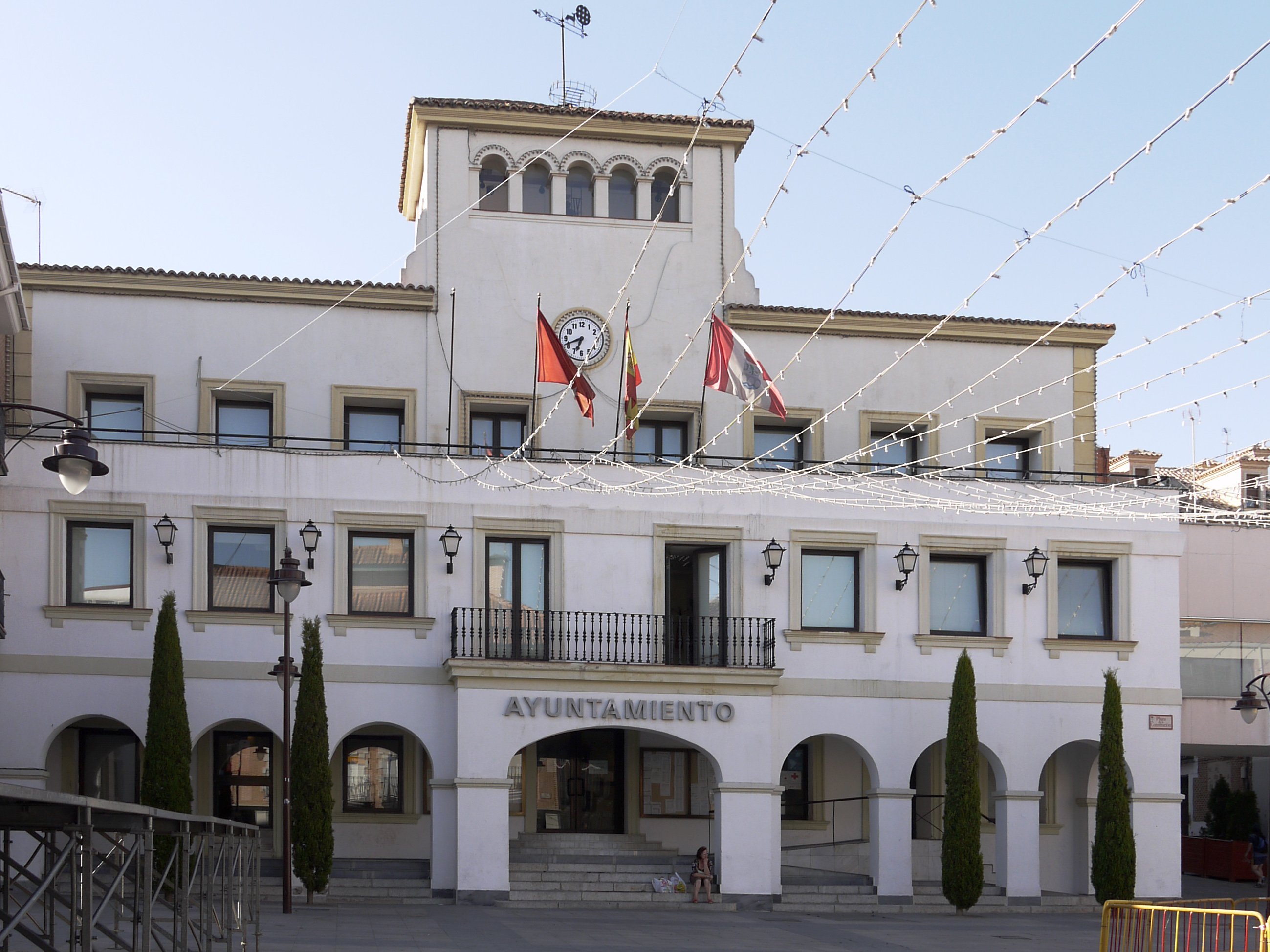 Ayuntamiento, San Sebastián de los Reyes, Comunidad de Madrid, España.